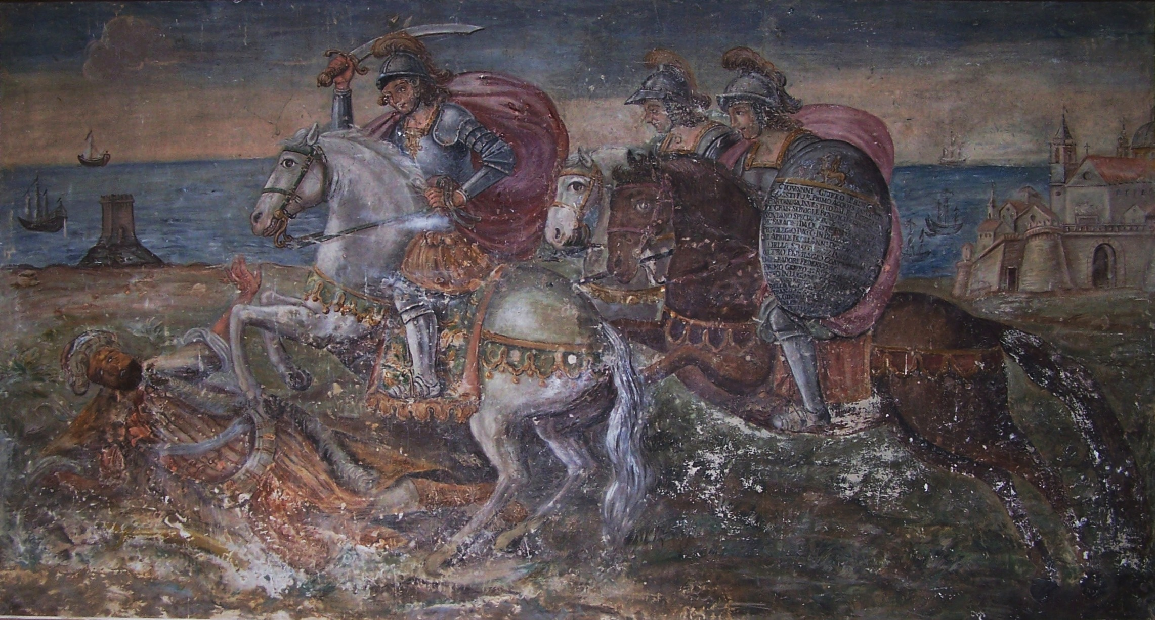 Autore foto: Giuseppe Grifeo/Peppe64. Affresco Sala delle Feste, Castello Grifeo, Partanna (Tp) Licensing (uso)